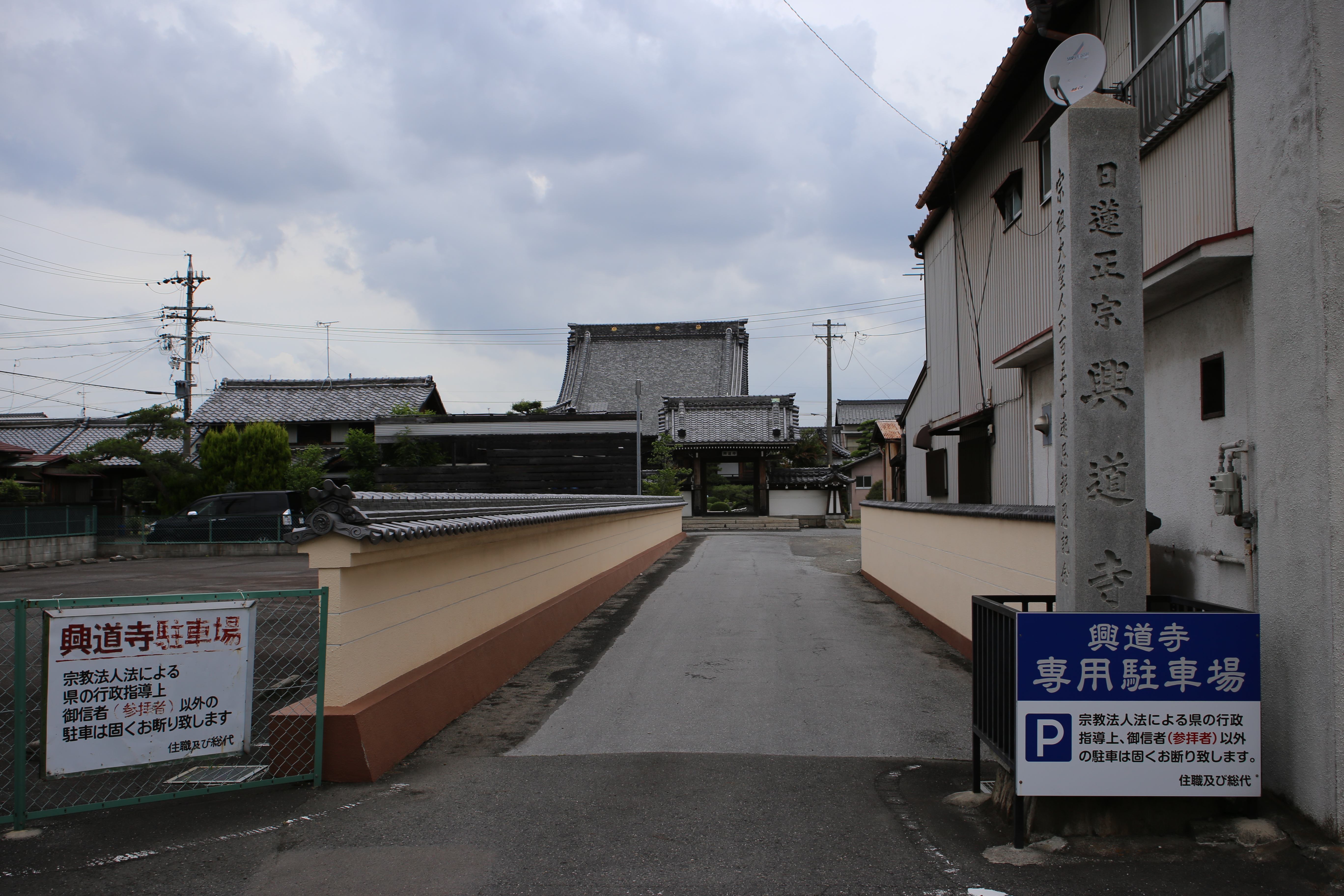 愛知県岩倉市西市町寺西の日蓮正宗蓮華山興道寺を南側公道より撮影